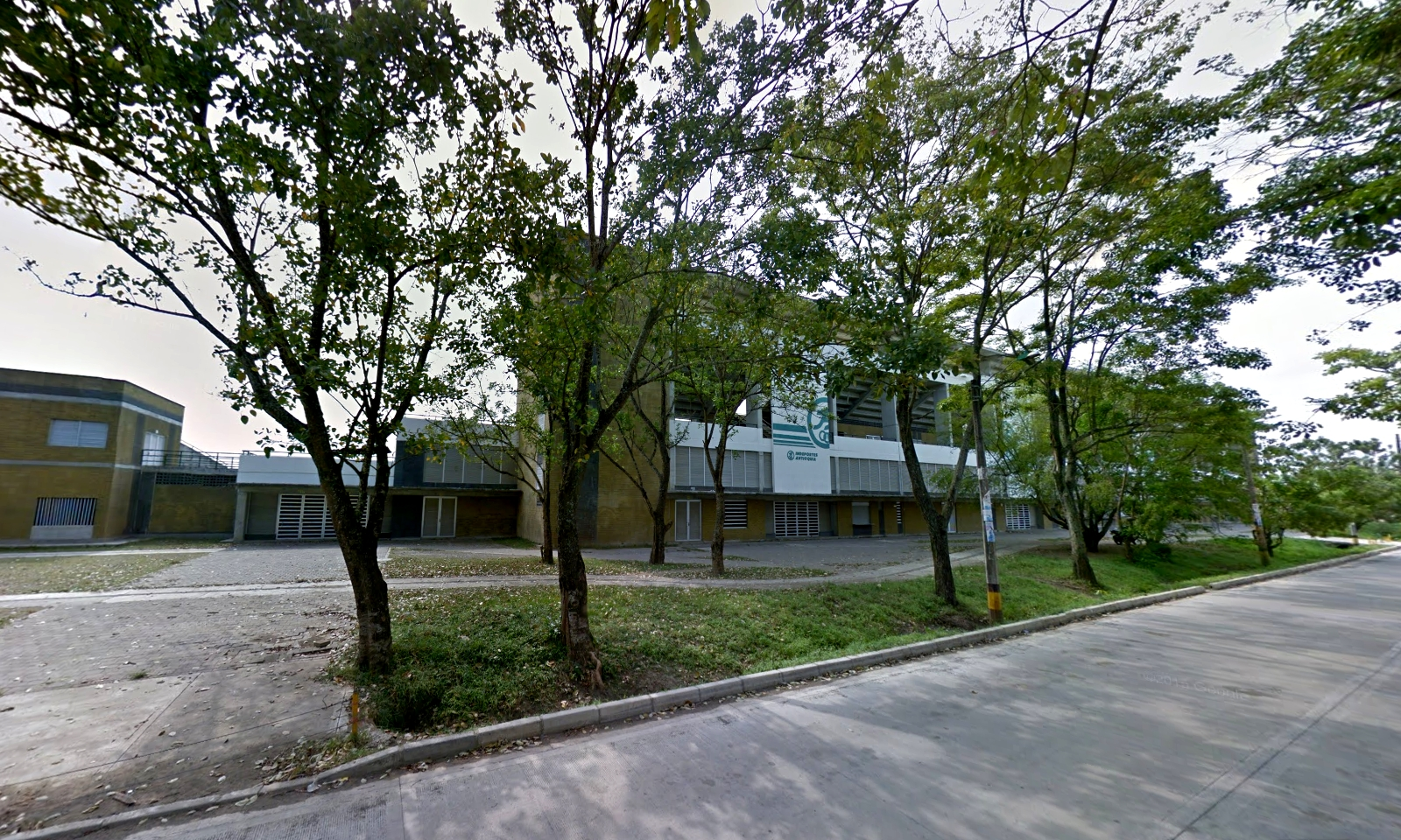 Vista peatonal a Fachada Principal